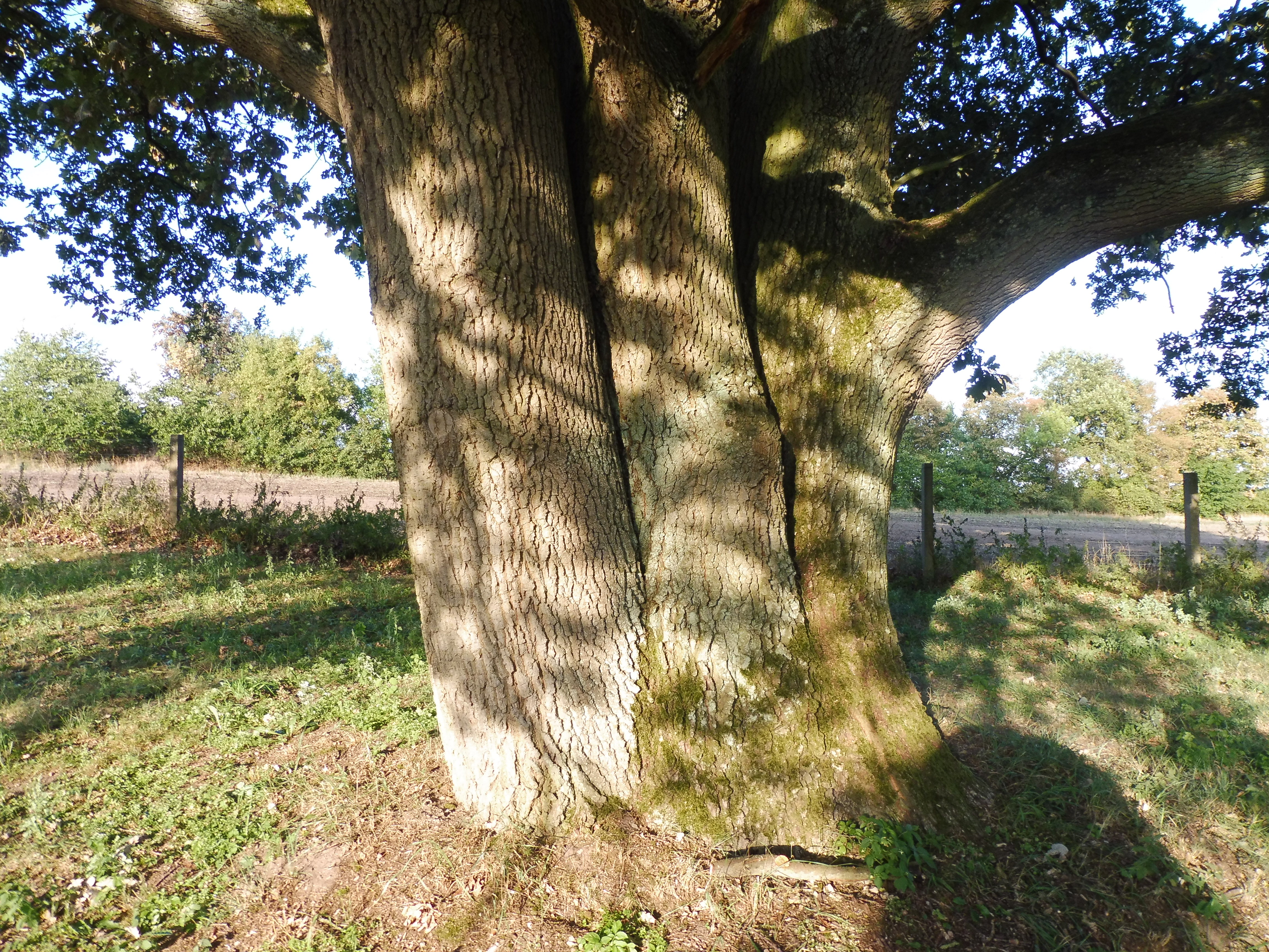 Dreistämmige Eiche in Zietlitz bei Dobbin